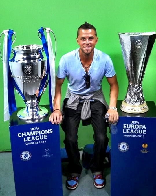 Danny Szetela